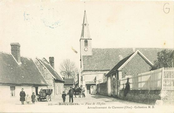 Habitants de Rouvillers